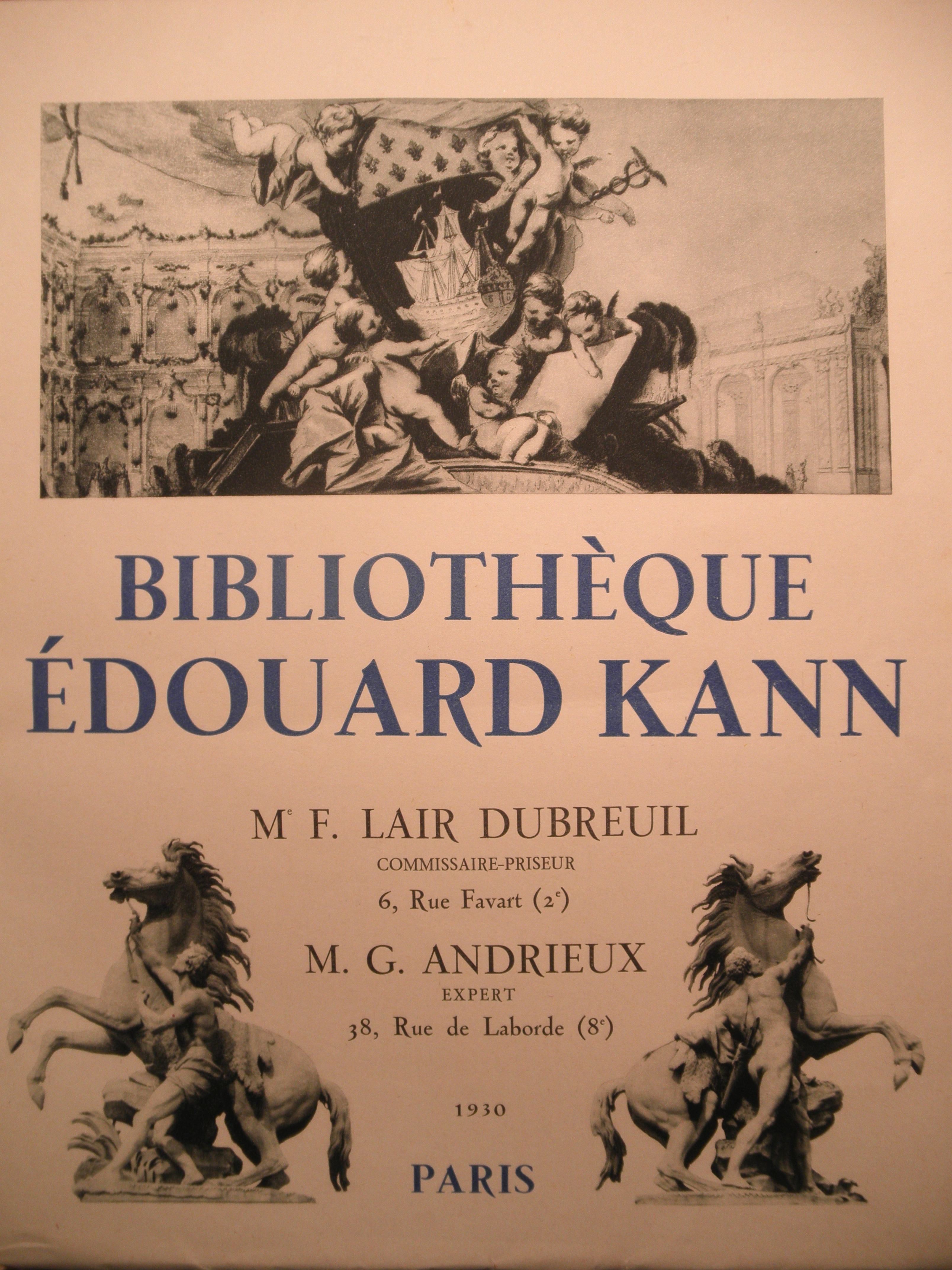 Catalogue de vente